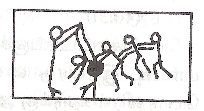 பூப்பூ புளியம்பூ விளையாட்டு முறையைக் காட்டும் கோட்டுருப் படம். மறைகின்ற விளையாட்டுகள் என்னும் எனது நூலிலிருந்து எடுத்துப் பதிவேற்றப்பட்டது.